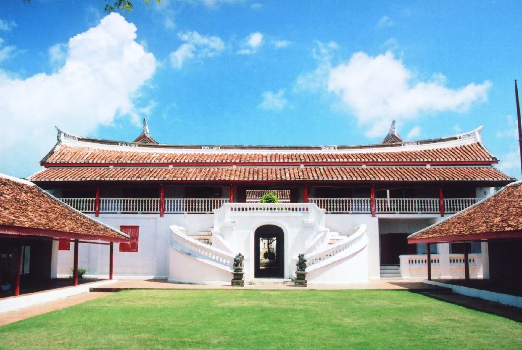 Songkhla national museum